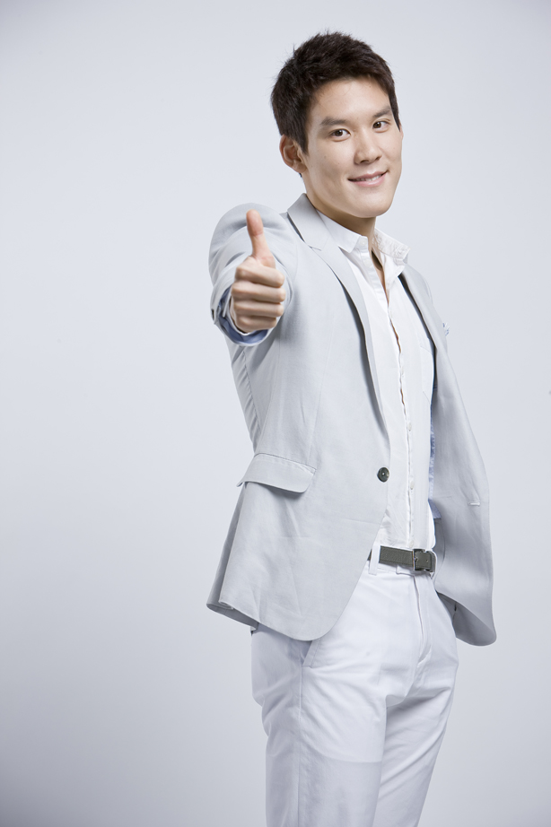 LG Whisen 박태환 광고사진